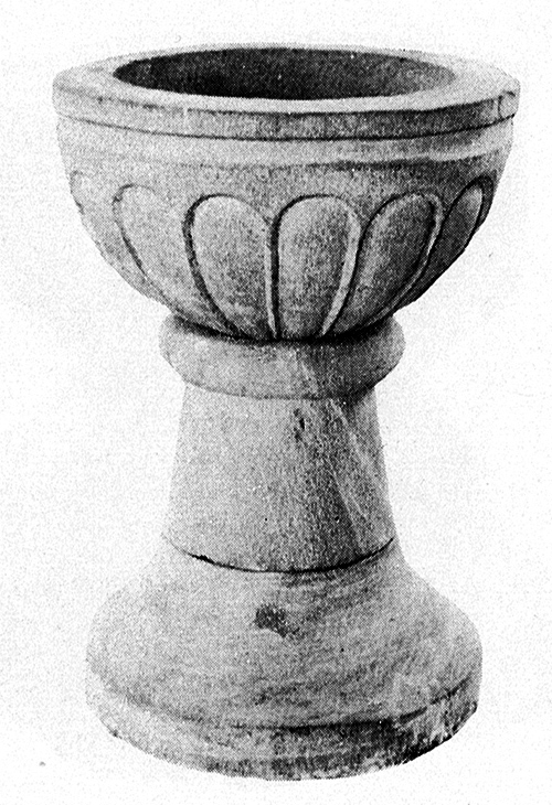 Sandhults kyrka. Dopfunt